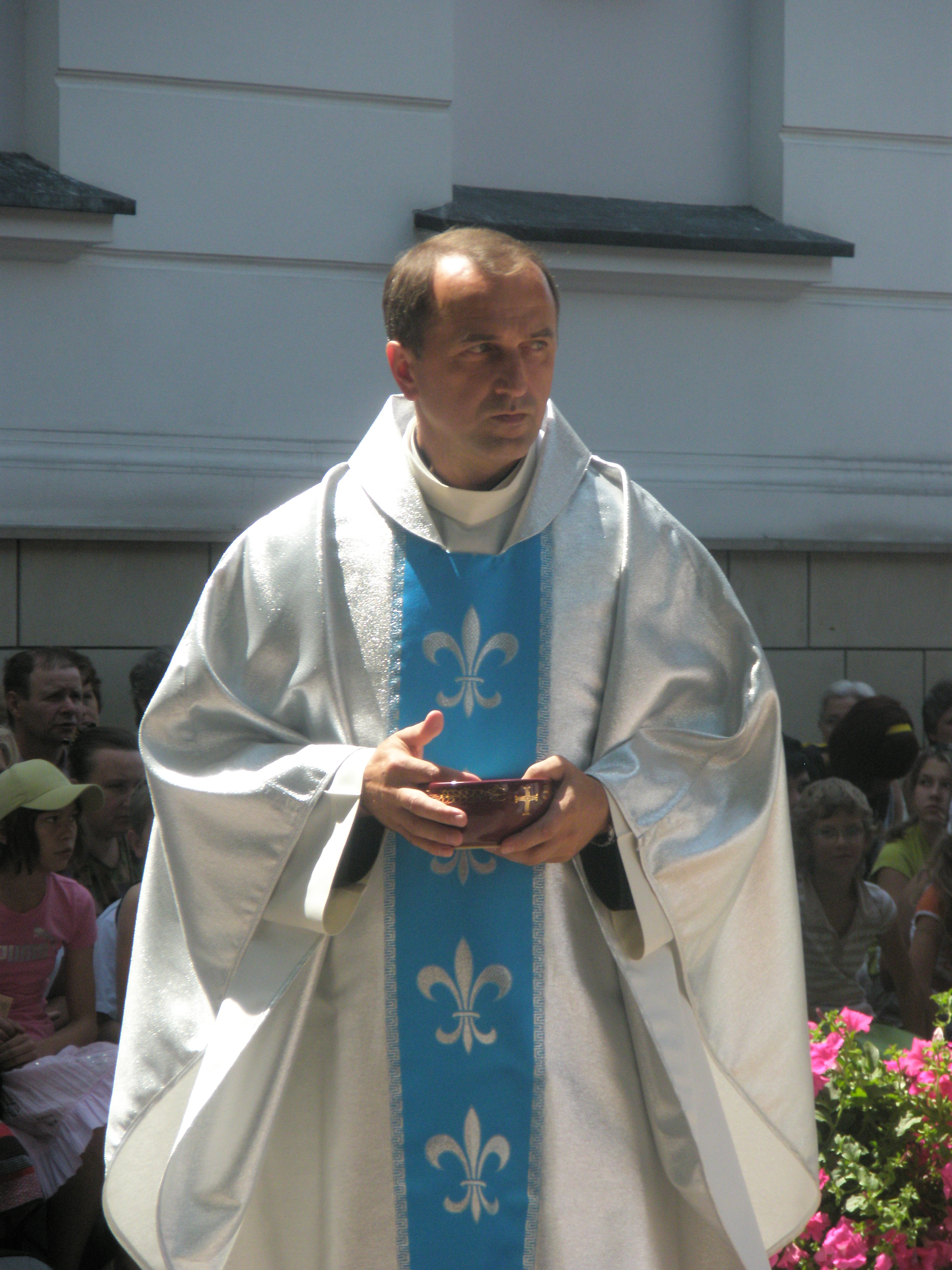 Zdjęcie o. Ryszarda Bożka wykonane na Wielkim Odpuscie Tuchowskim